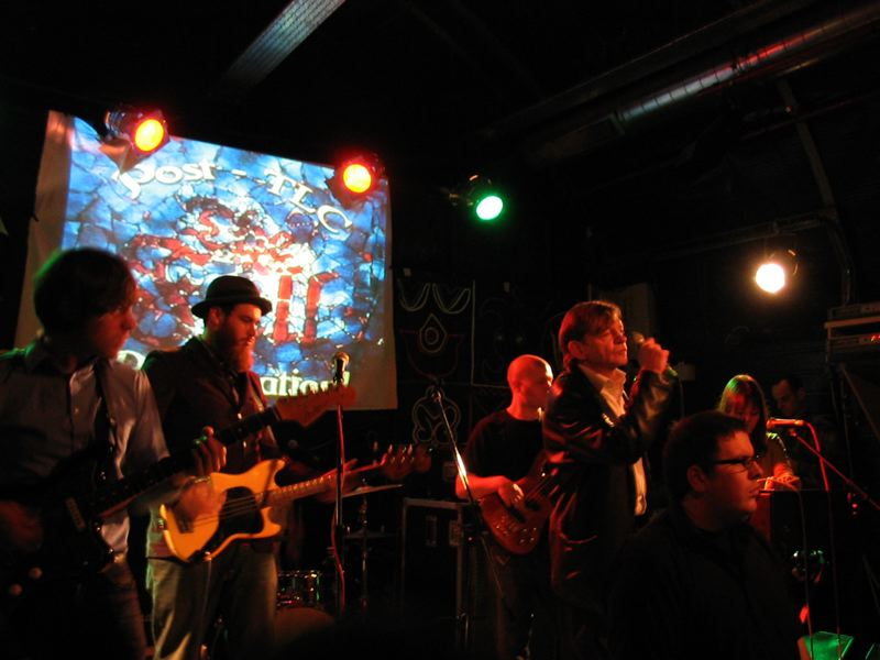 The Fall